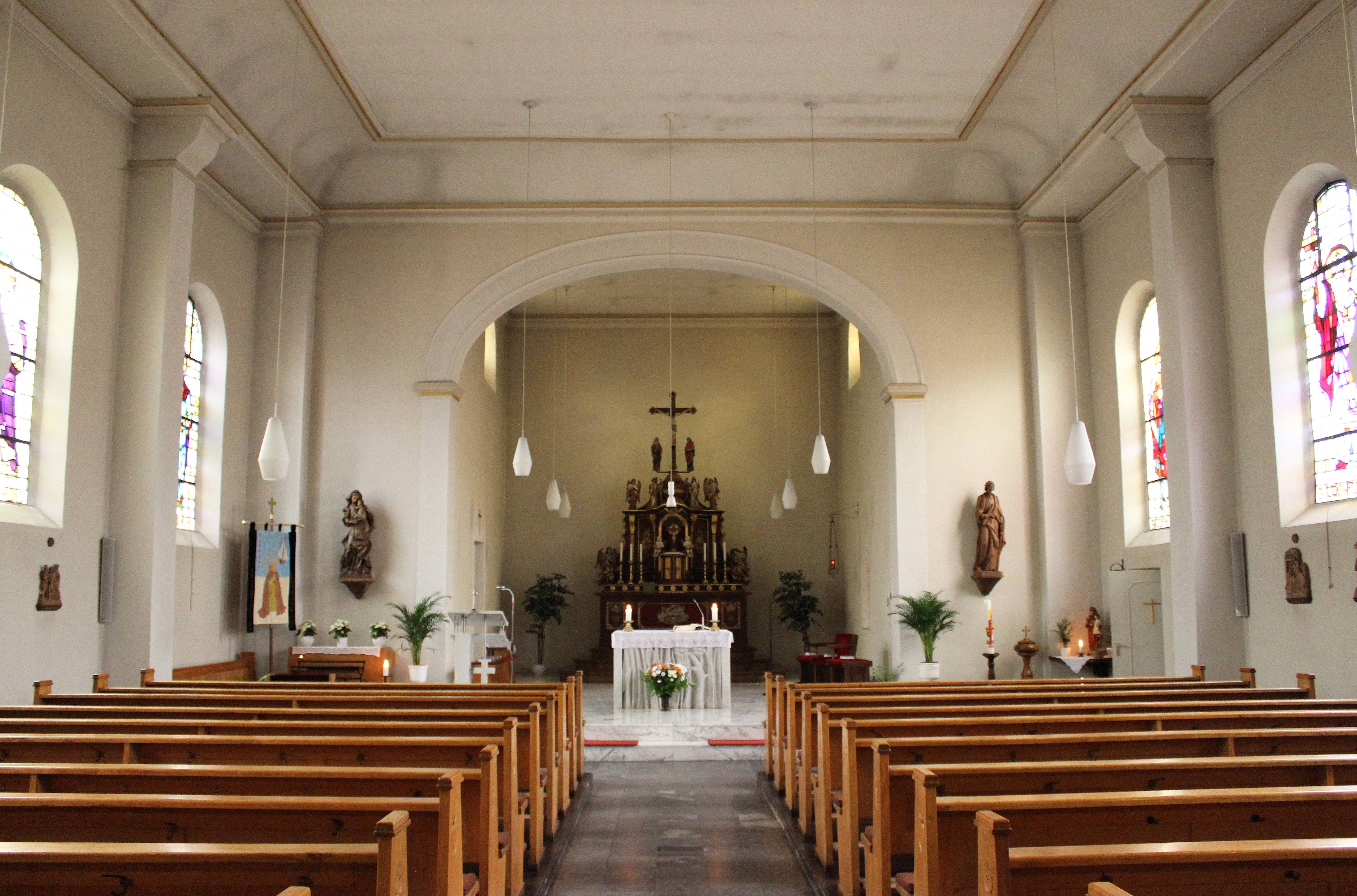 Blick ins Innere der katholischen Pfarrkirche St. Antonius in Werbeln, Gemeinde Wadgassen, Landkreis Saarlouis, Saarland